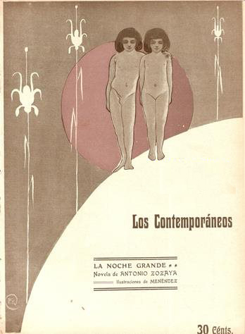 Portada de La noche grande.